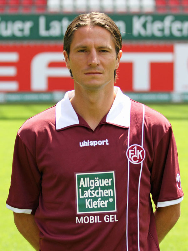 Alexander Bugera, Fußballspieler